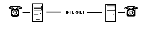 Schema Voip